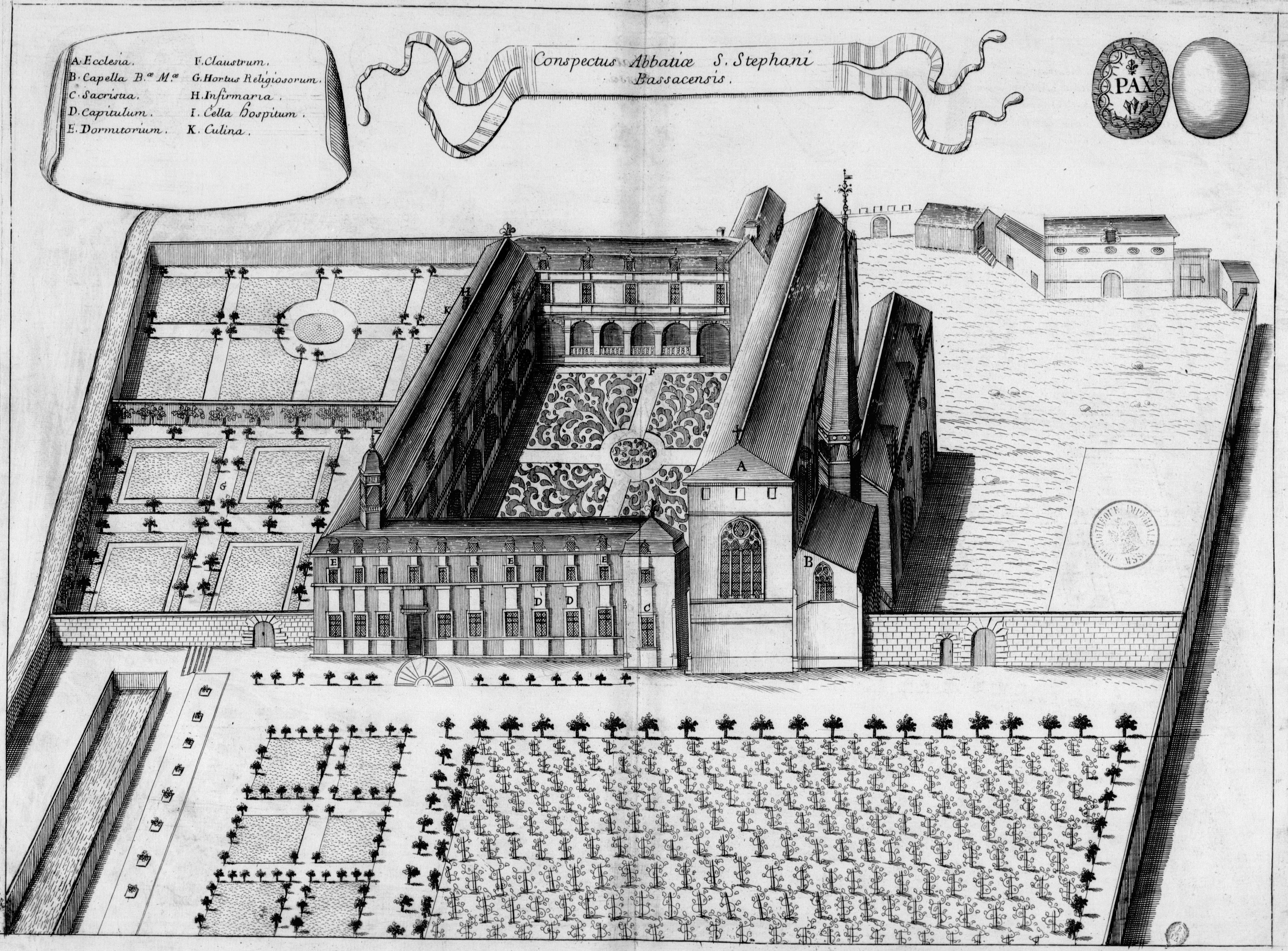 Planche gravée du 17ème siècle représentant l'abbaye Saint-Étienne de Bassac, en France, dans le livre Monasticon Gallicanum.